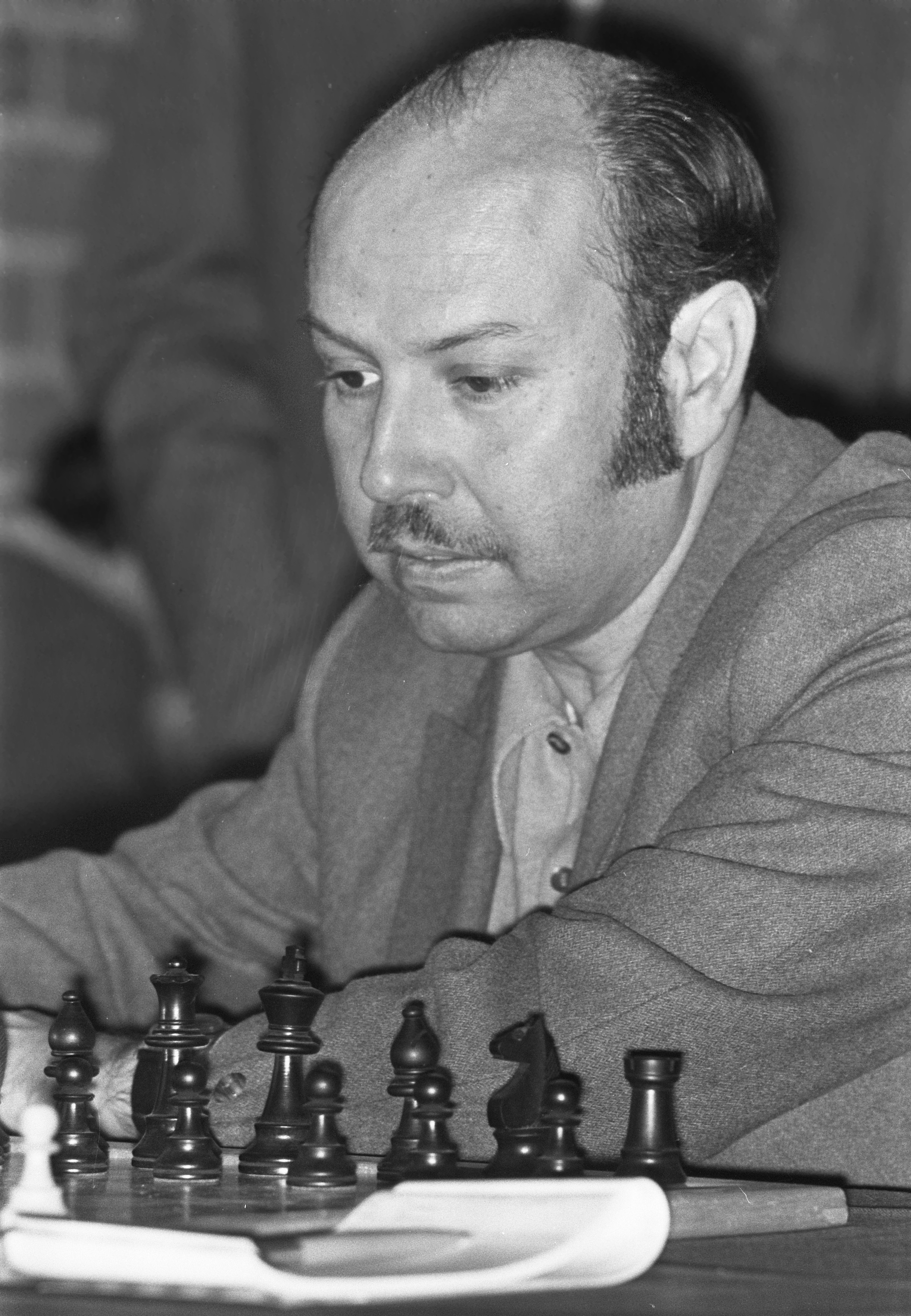 Arturo Pomar